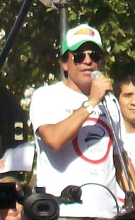 Juan Palomino en el Día de la Memoria en Plaza de Mayo, 24/3/2010